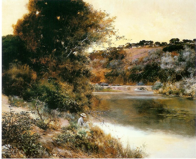 Paisaje de José Pinelo Llull